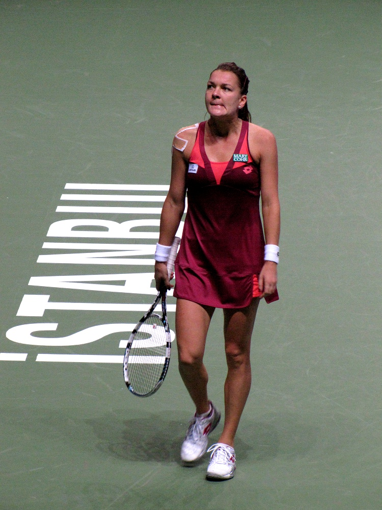 Radwańska w kończących sezon Mistrzostwach WTA w Stambule - mecz z Mariją Szarapową